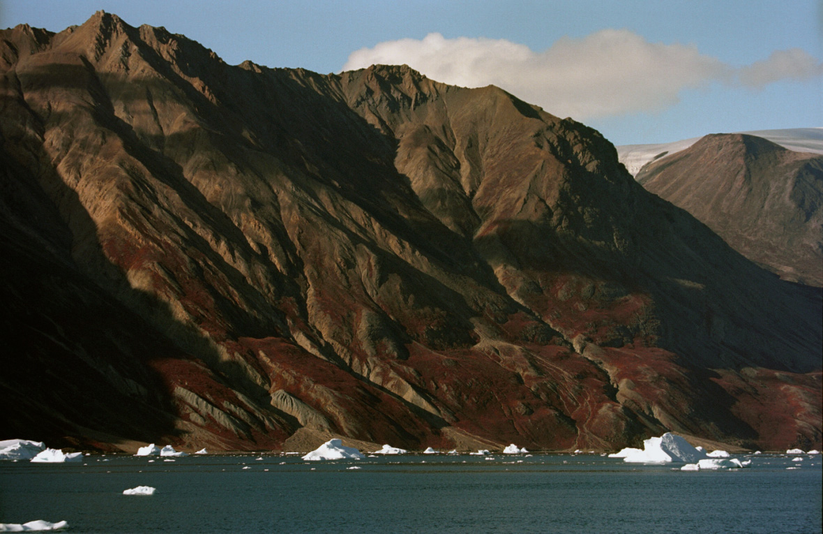 Greenland, Rhode Fjord